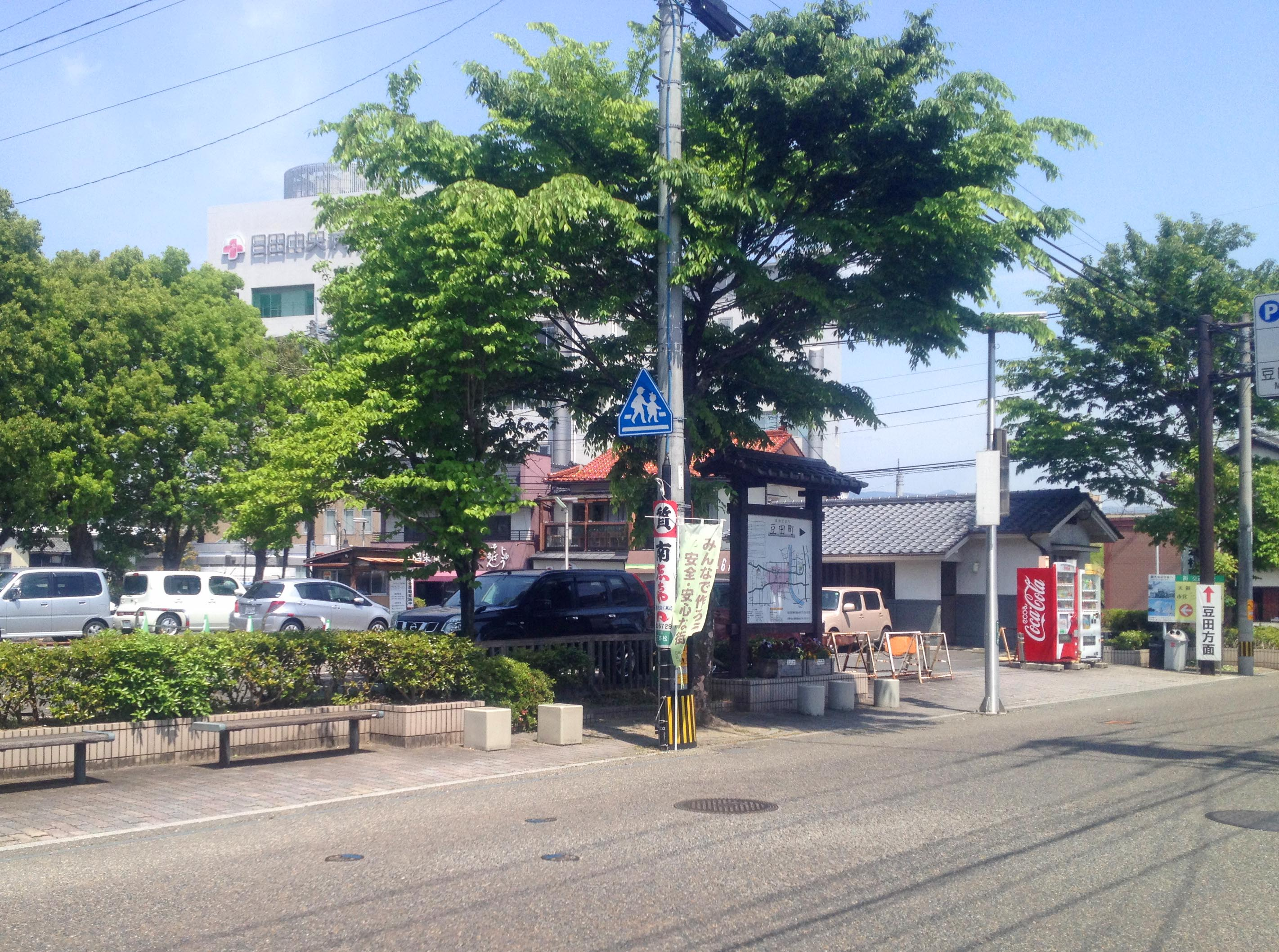 日田養育館跡を東側から。 日田養育館（ひたよういくかん）は、現在の日田市営三本松駐車場（大分県日田市三本松1丁目14−30）にあたる場所にあった日田県の児童養育施設。